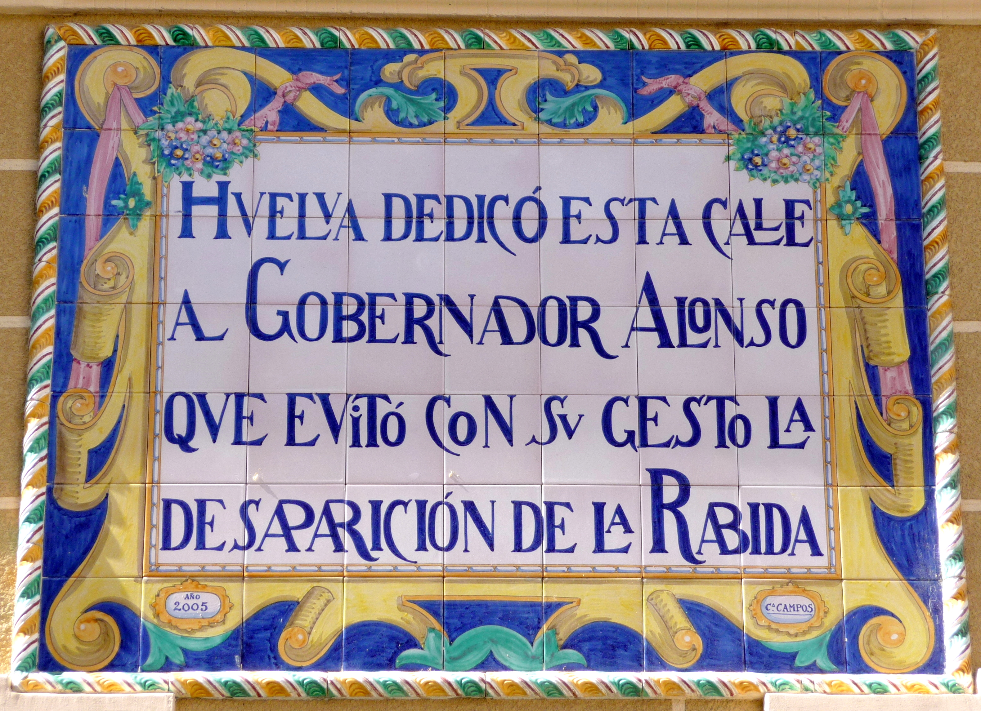 Placa homenaje al gobernador civil Alonso. Huelva.